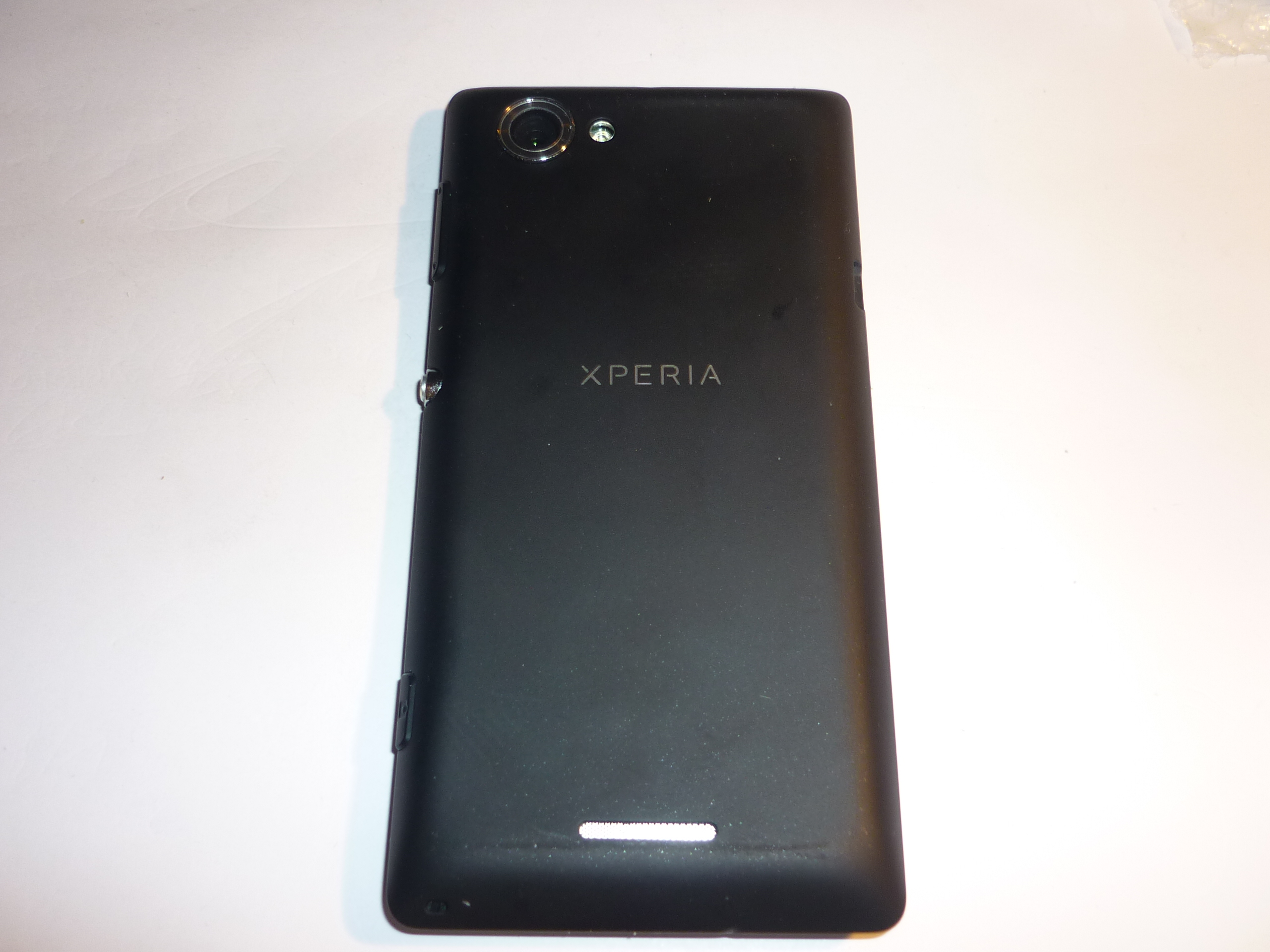 Sony Xperia L Back